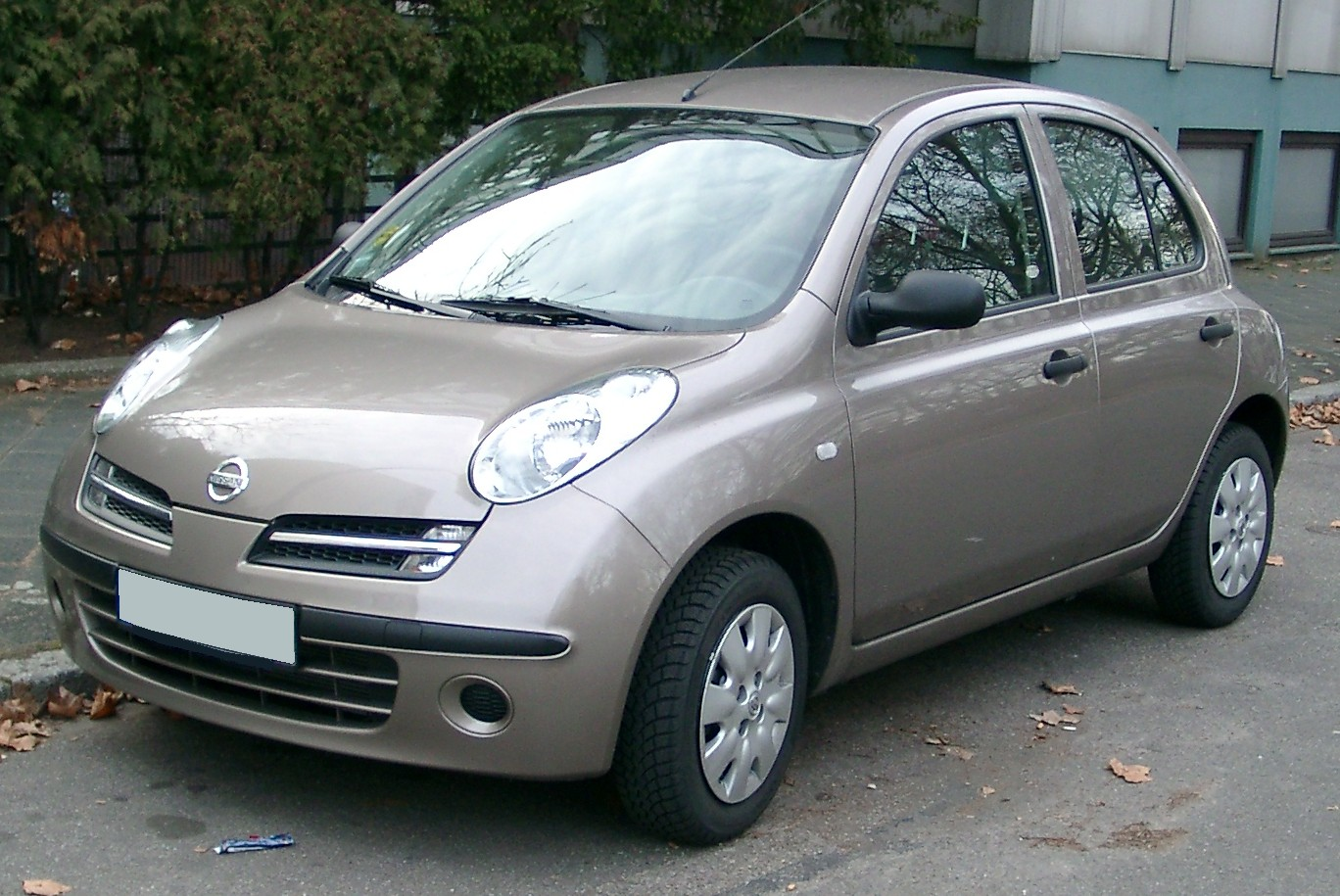 Nissan Micra, 3. Generation